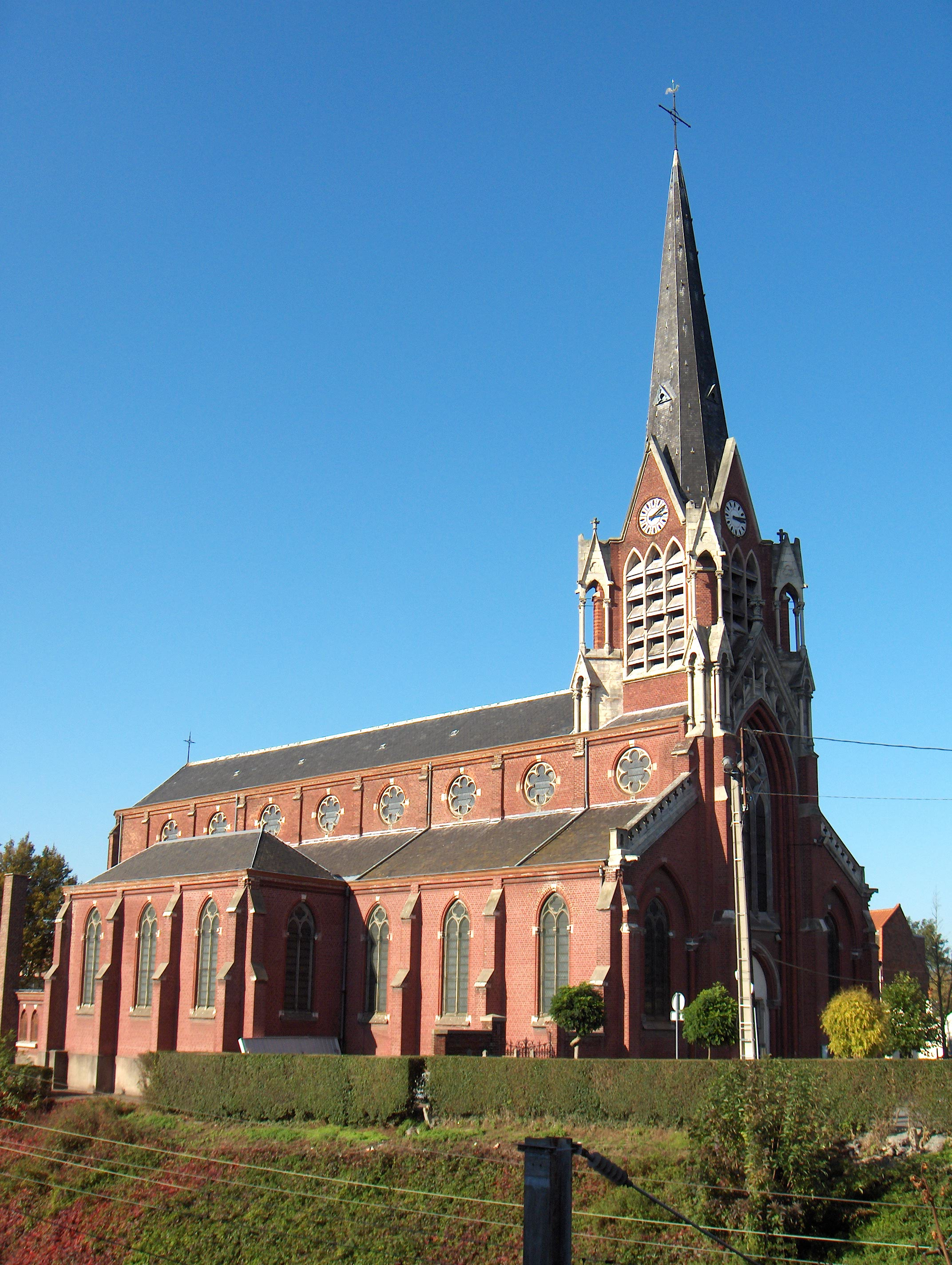 Pérenchies (France, dept. Nord), église Saint-Léger